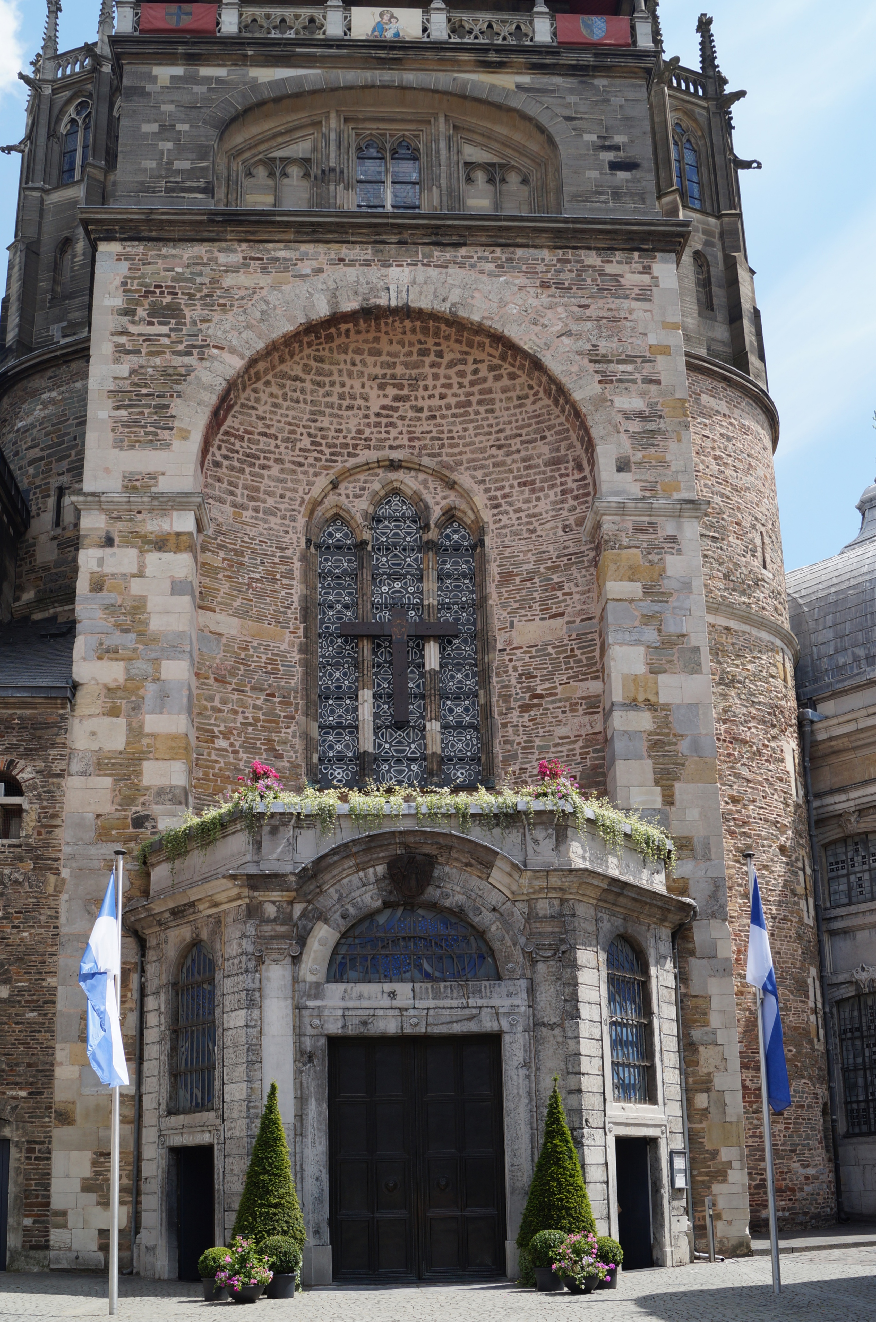 Aachener Dom Westwerk